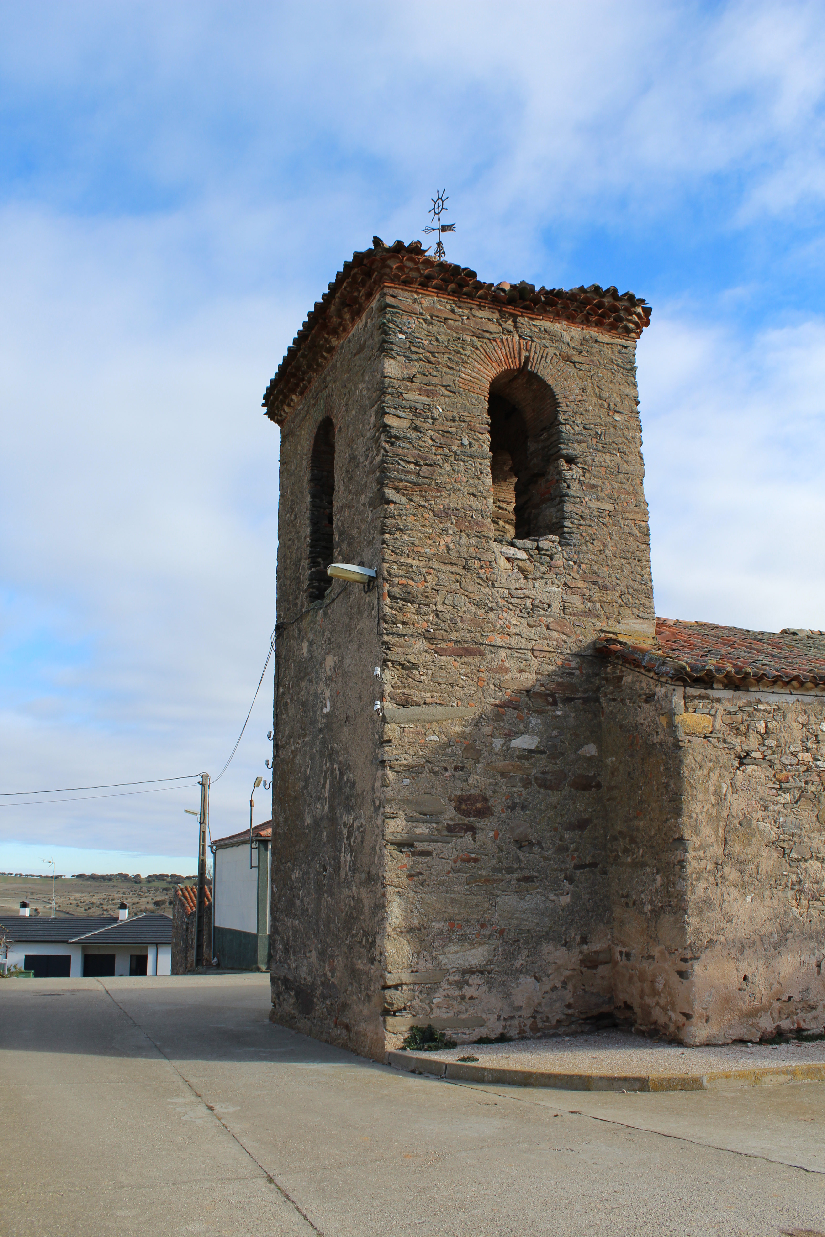 Iglesia de Buenavista del siglo XVI. Esta Iglesia se vendió a un particular a finales de los 70, principios de los 80 del siglo XX, en la actualidad sirve de almacén a un agricultor del pueblo.